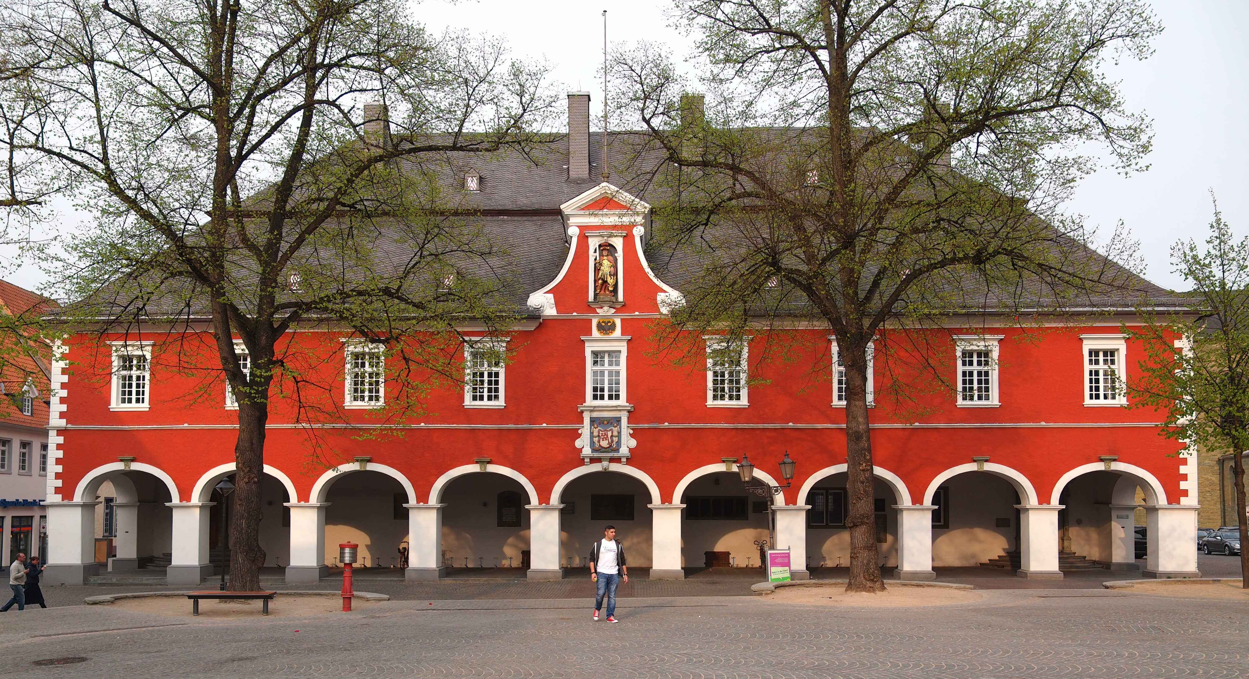 Westseite des Rathauses in Soest, Rathausstraße 9, Denkmal, fotografiert anlässlich des 30. Wikipediastammtisches Sauerland This is a photograph of an architectural monument.